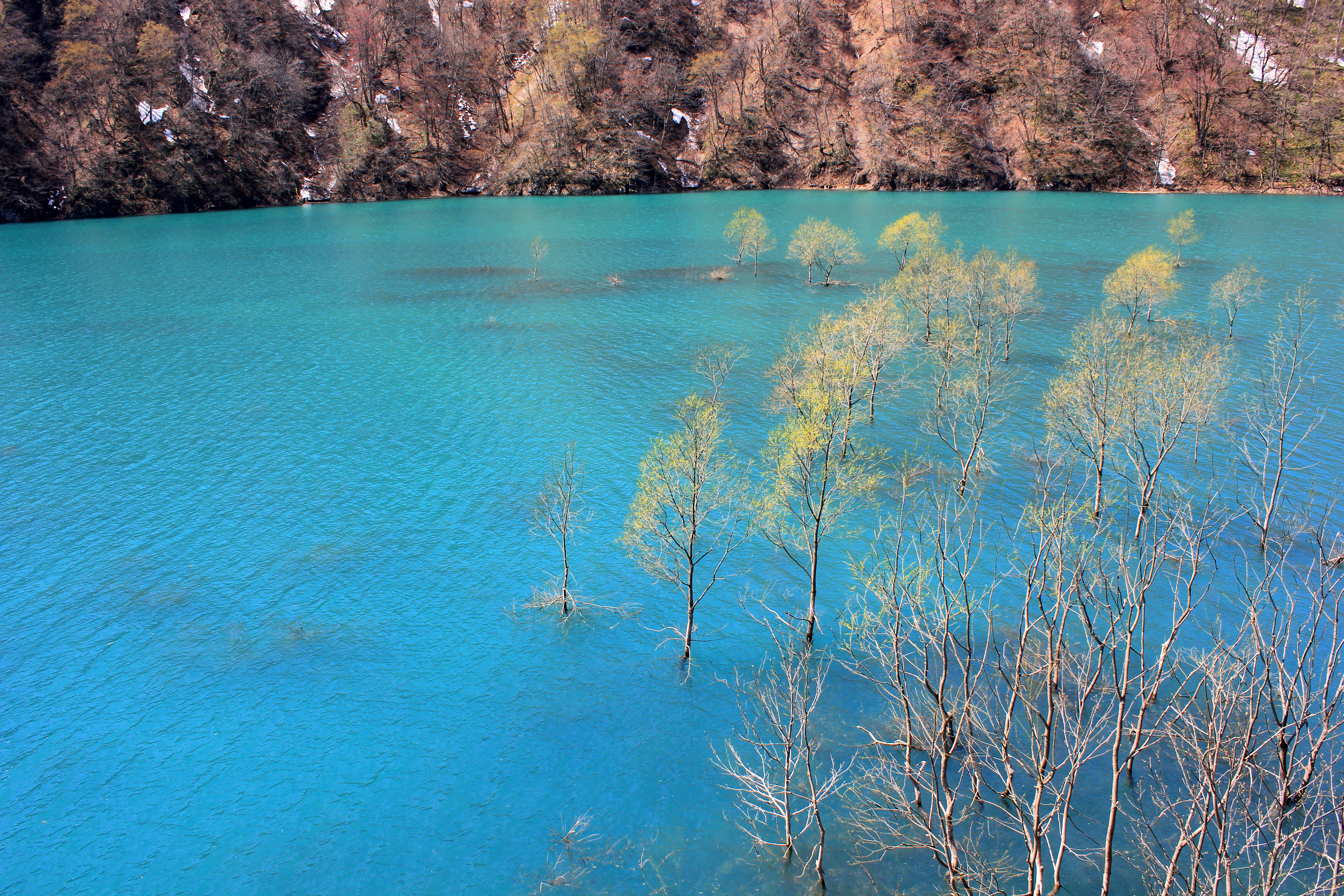 秋扇湖（鎧畑ダム貯水池。秋田県・玉川）